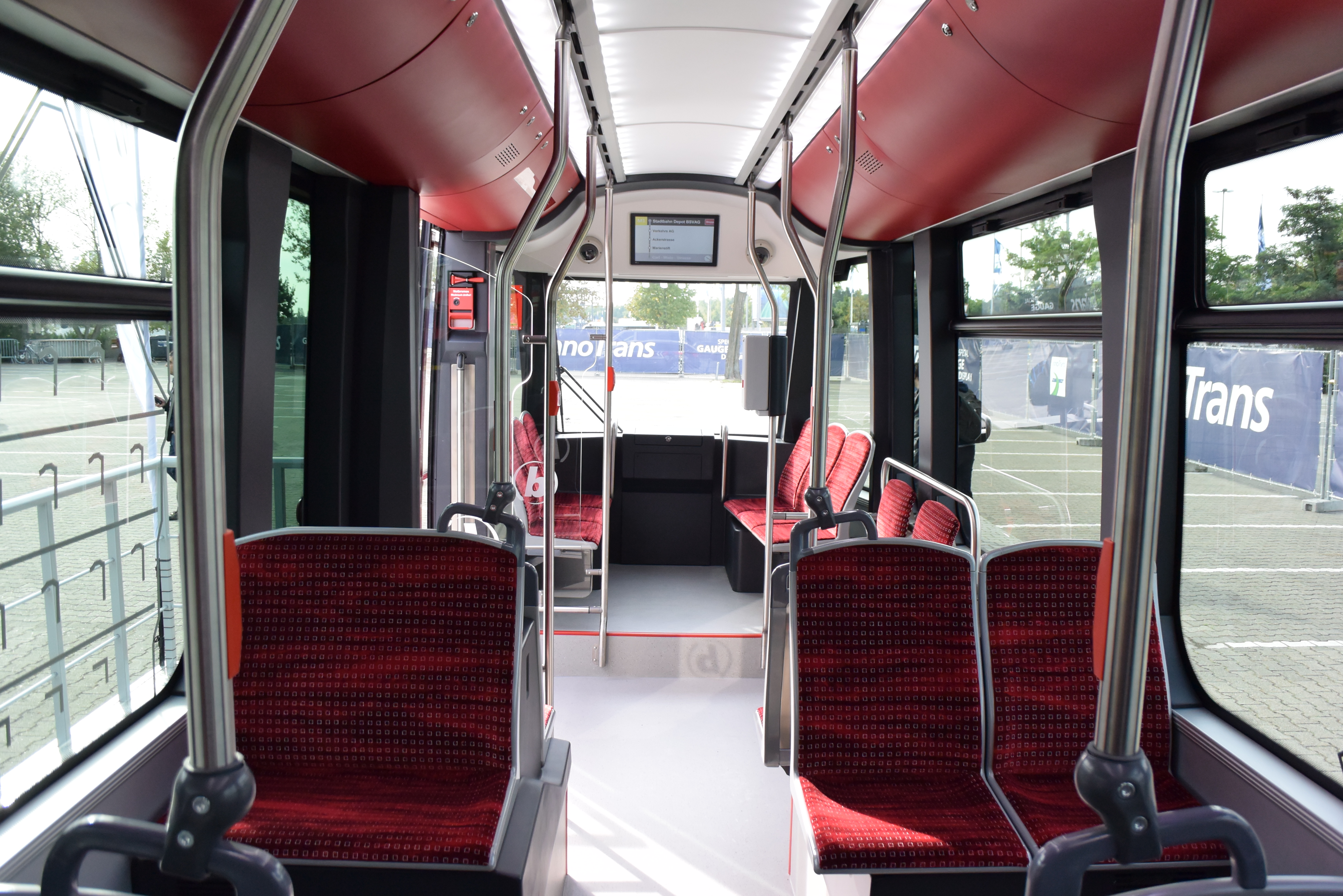 Solaris Tramino Braunschweig podczas InnoTrans 2014